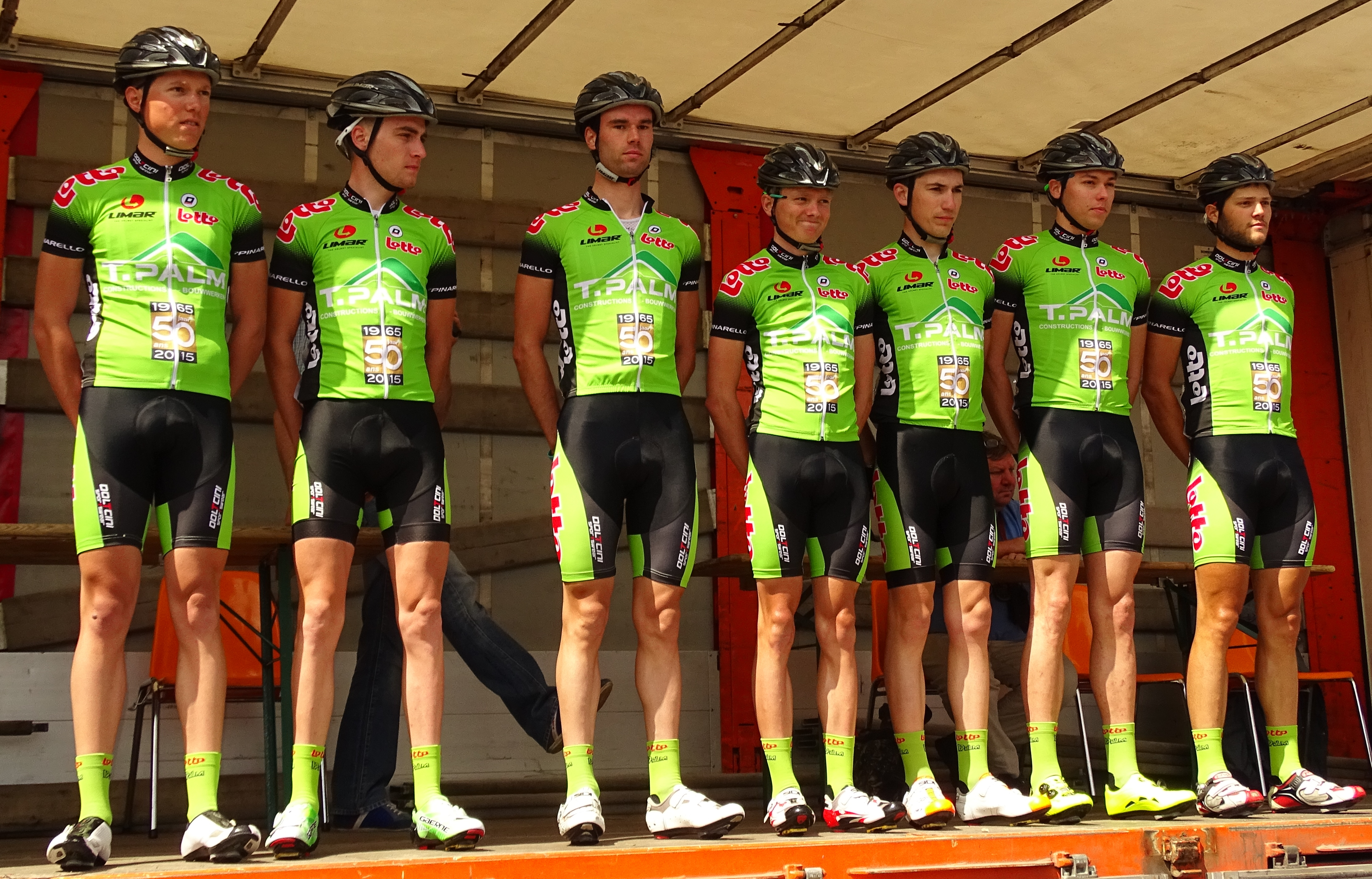 Reportage réalisé le dimanche 7 juin à l'occasion du départ du Mémorial Philippe Van Coningsloo 2015 à Wavre, Belgique.